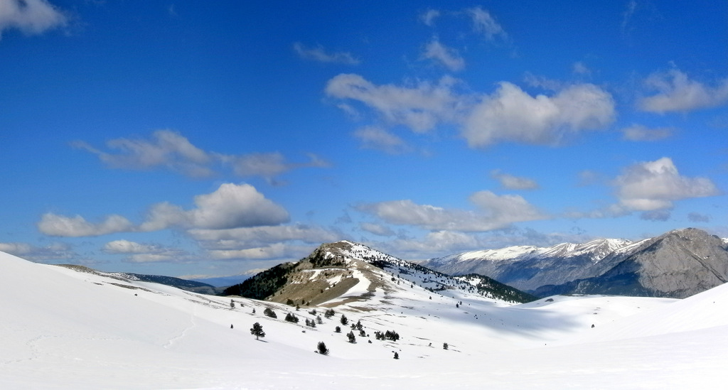 La Gallina Pelada, Serra d´Ensija